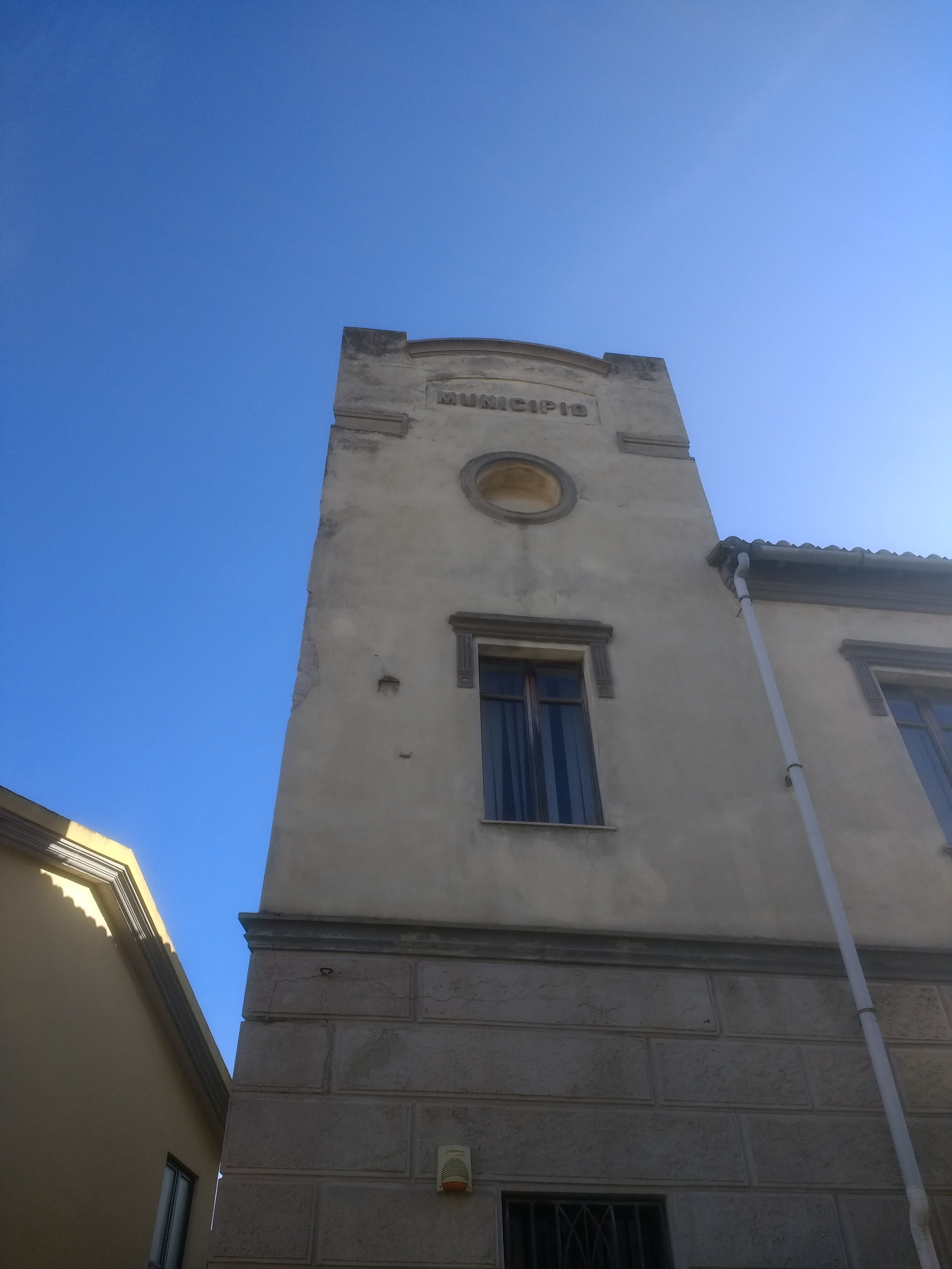 Foto scattata a Pirri nel dicembre 2019